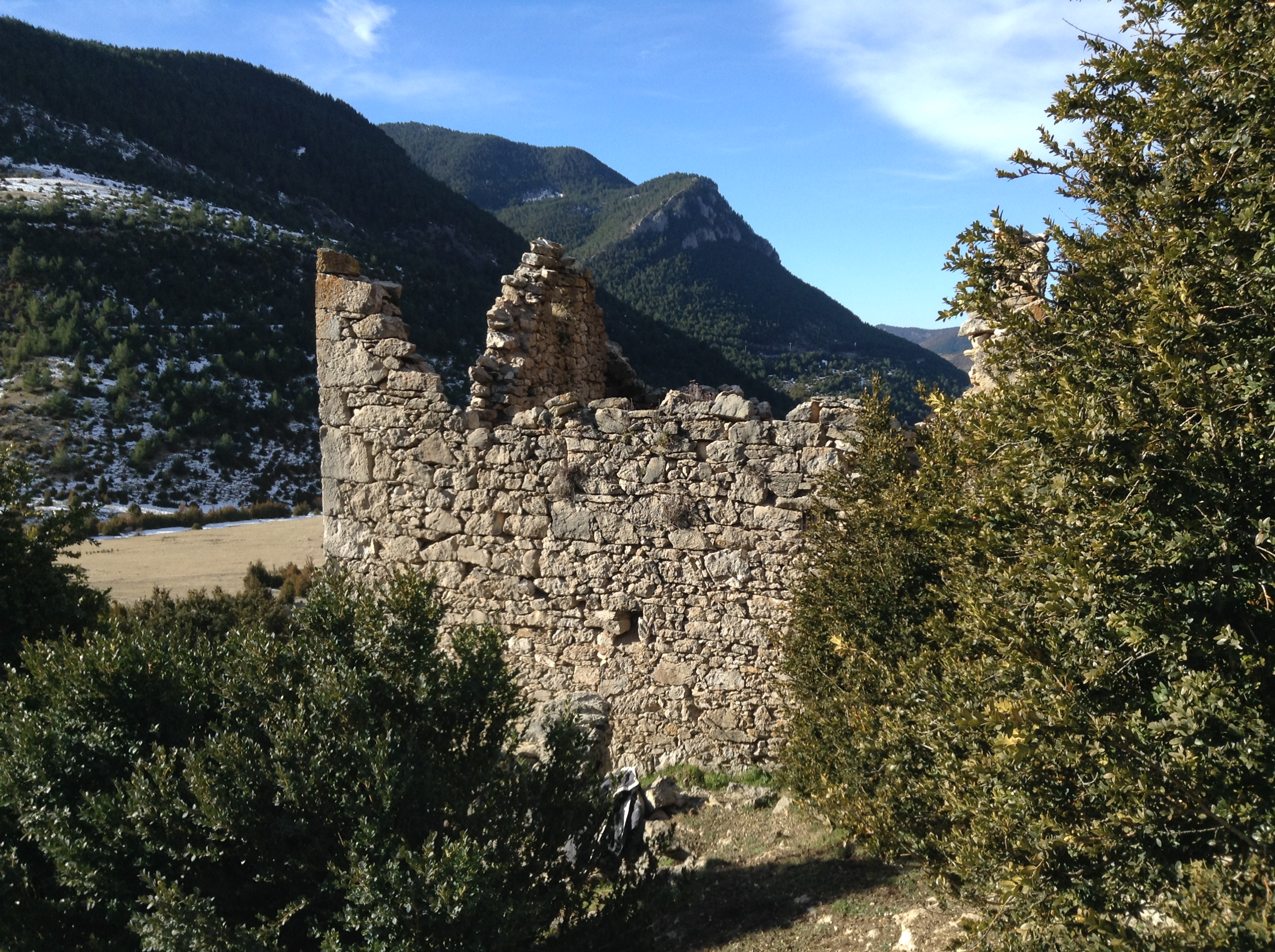 Casa en ruïnes del lloc de Cerneres, al terme municipal de Josa i Tuixén.